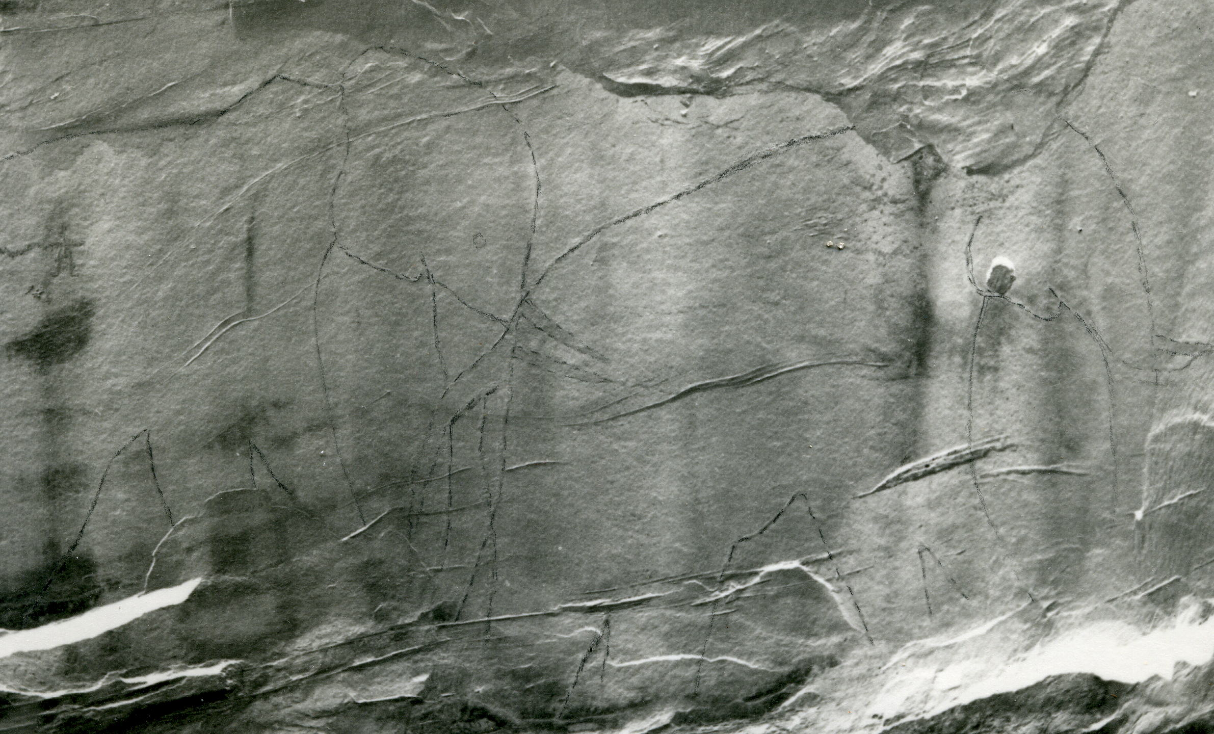 gravure préhistorique du Sud-oranais (Algérie)